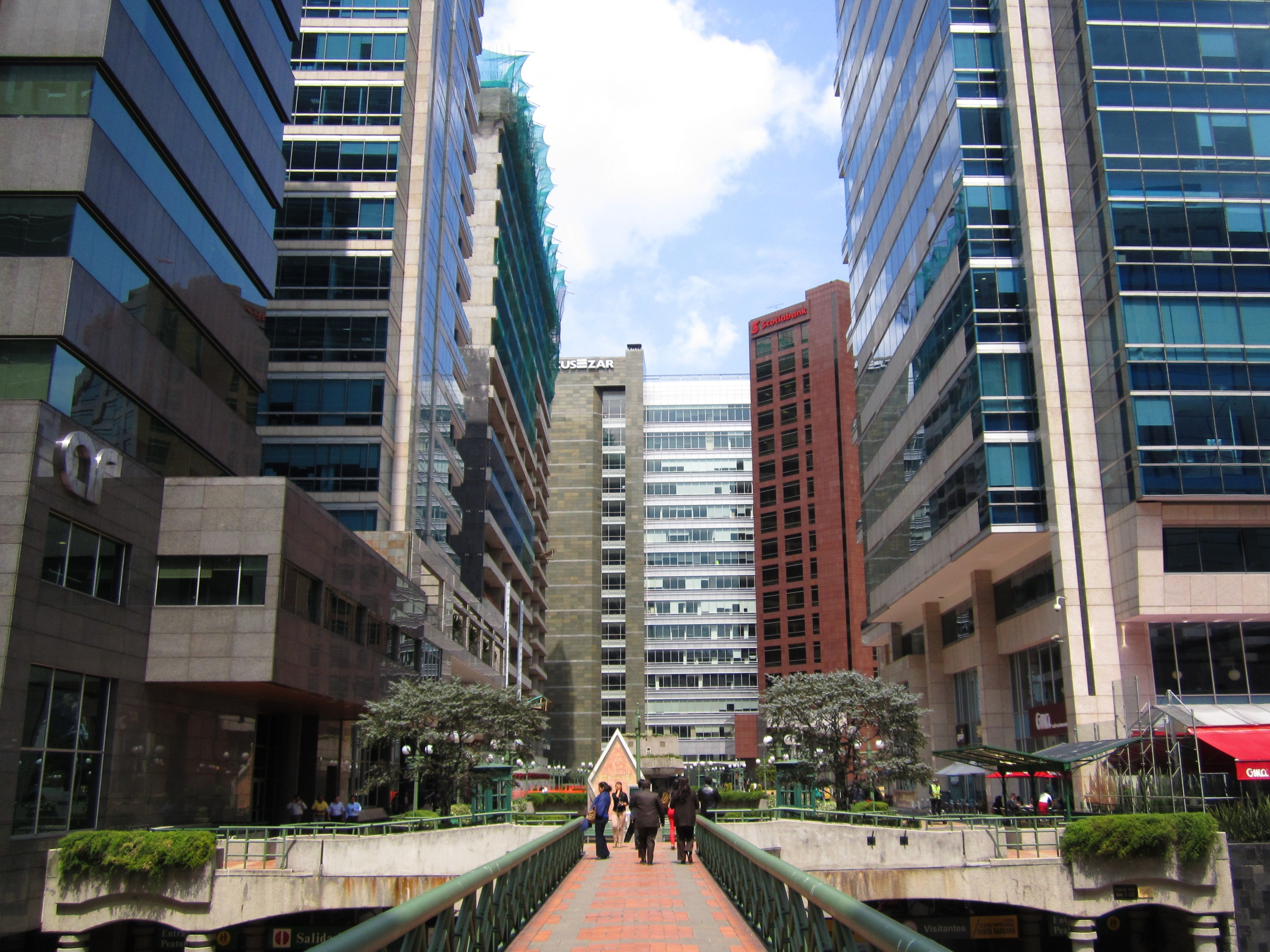 Vista de sur a norte. Zona central del complejo Centro Empresarial Santa Bárbara en la localidad de Usaquén en el norte de Bogota.